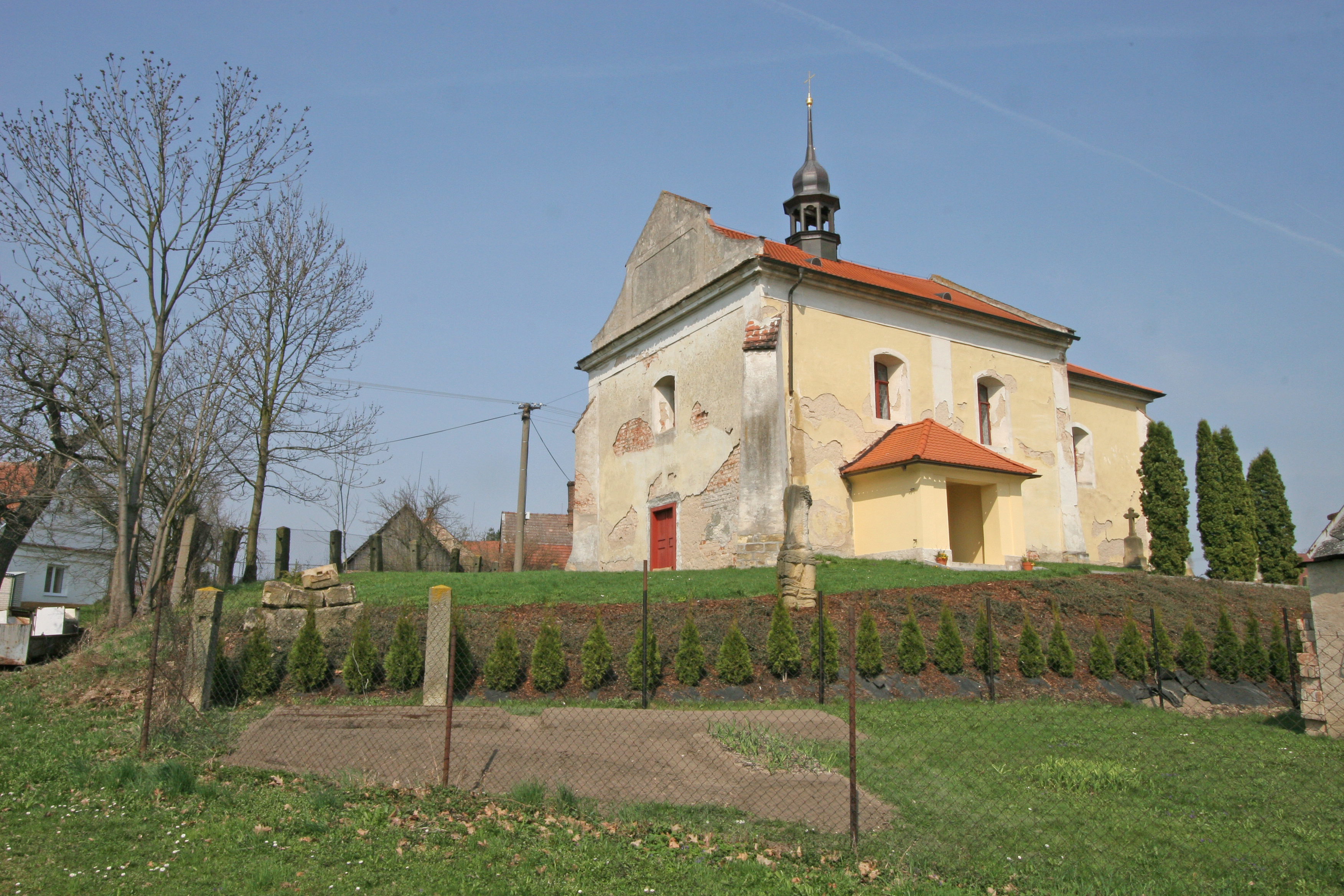 Stará Voda - Kostel Svatého Václava